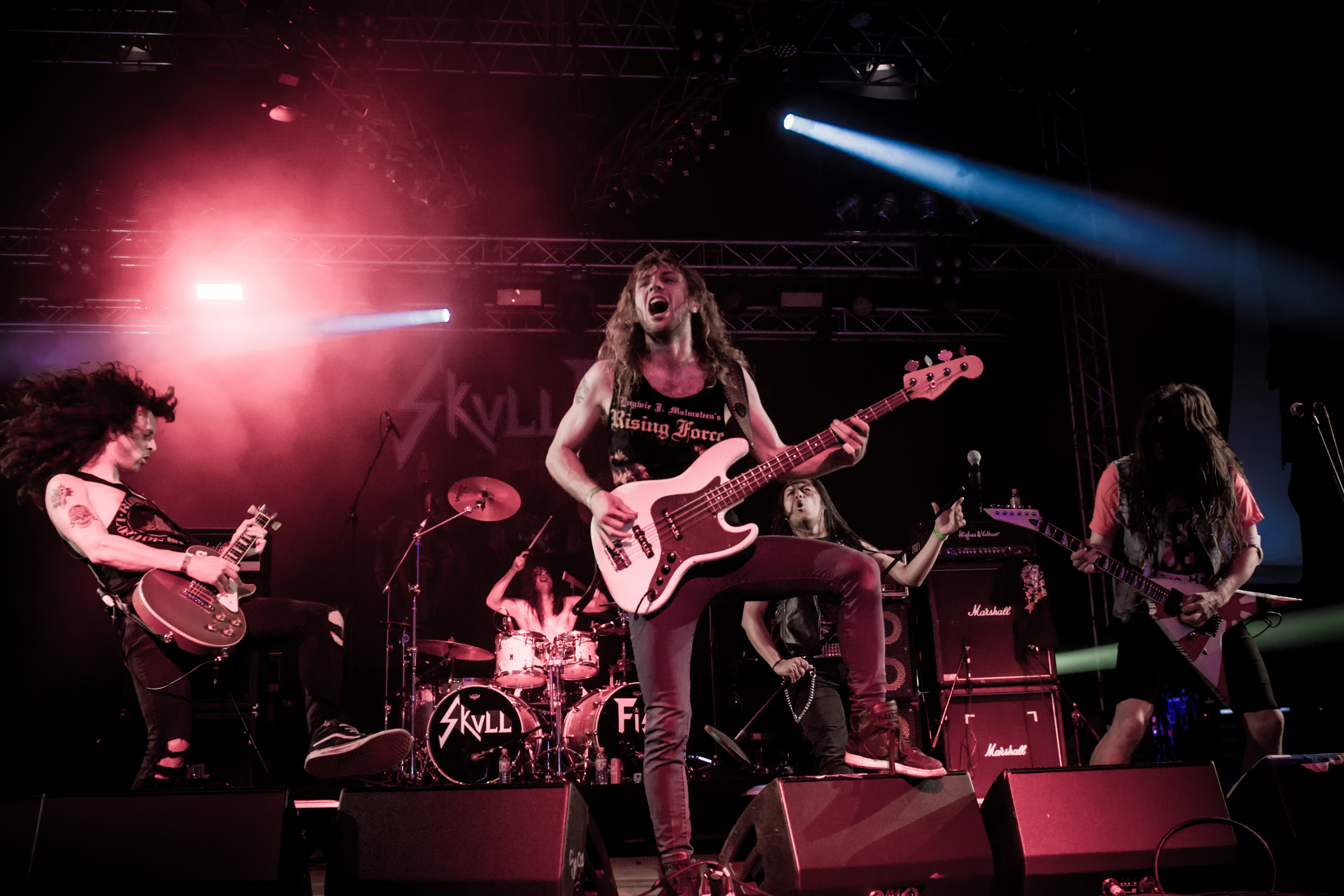 Skull Fist beim Wacken Open Air 2017